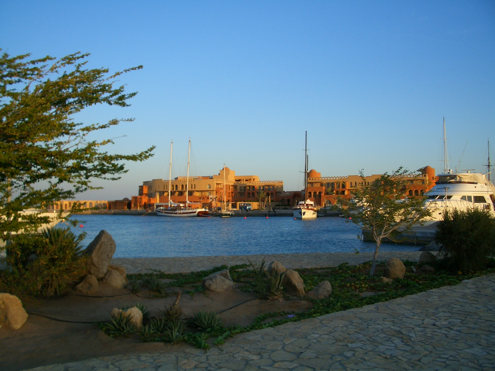 El-Gouna in Egypt